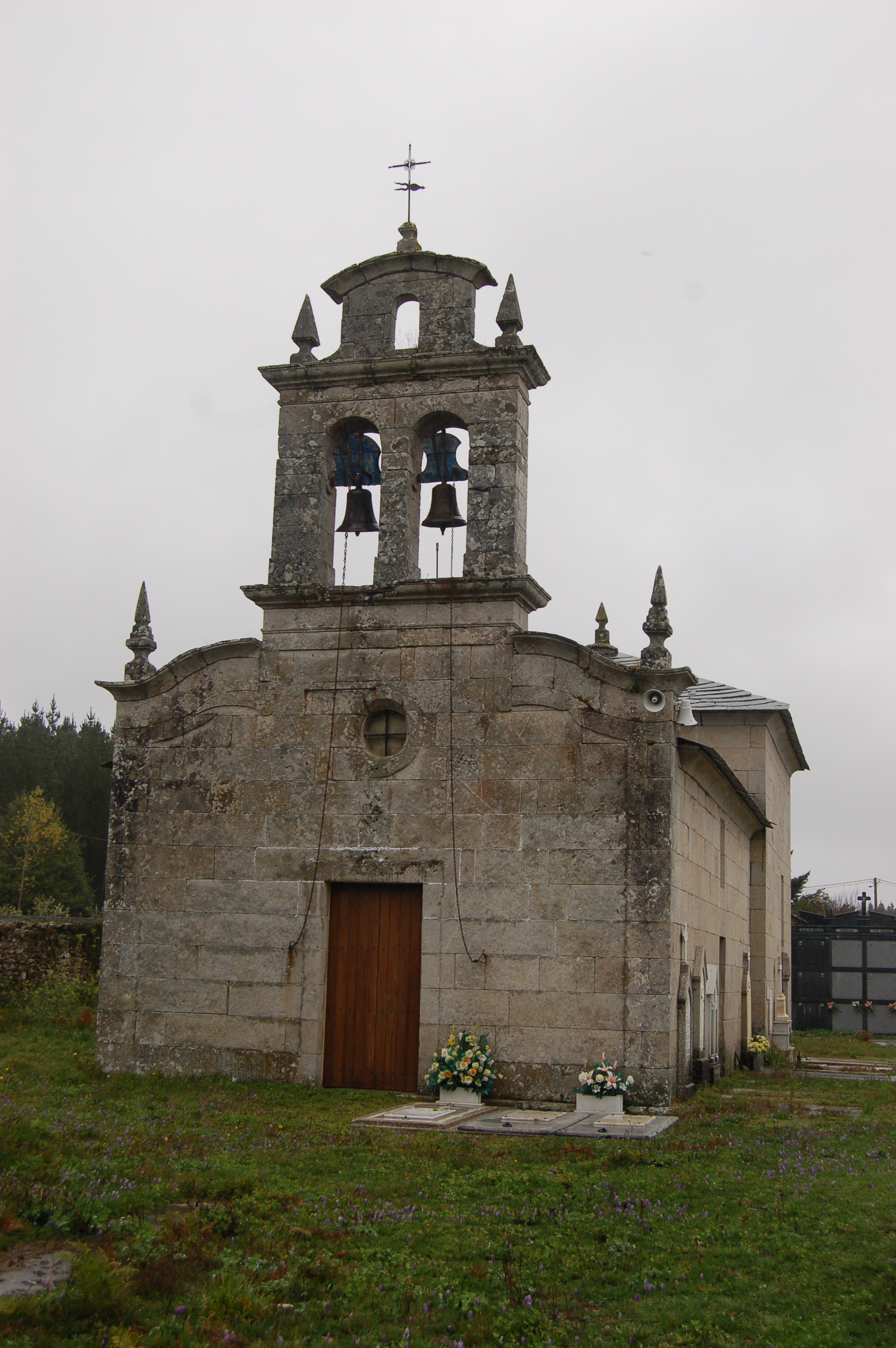 Vista xeral da igrexa parroquial de Vilachá de Mera (Lugo)